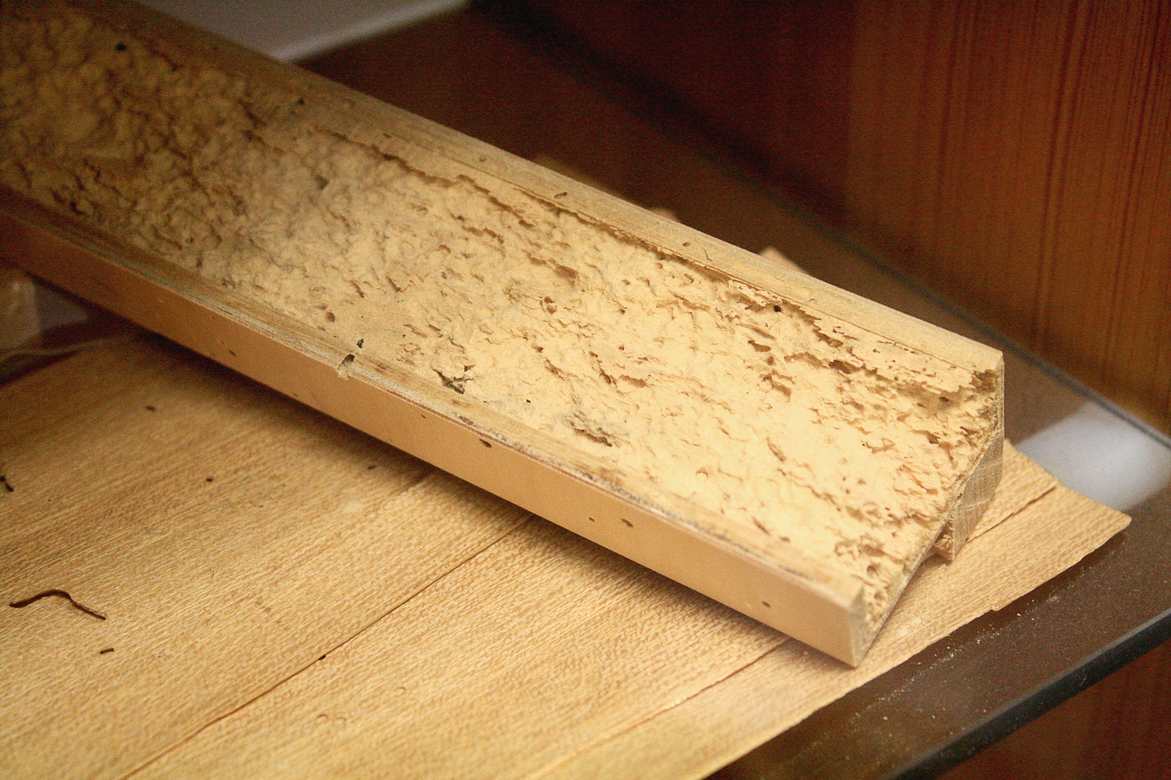 Fraßbild vom Braunen Splintholzkäfer (Lyctus brunneus)